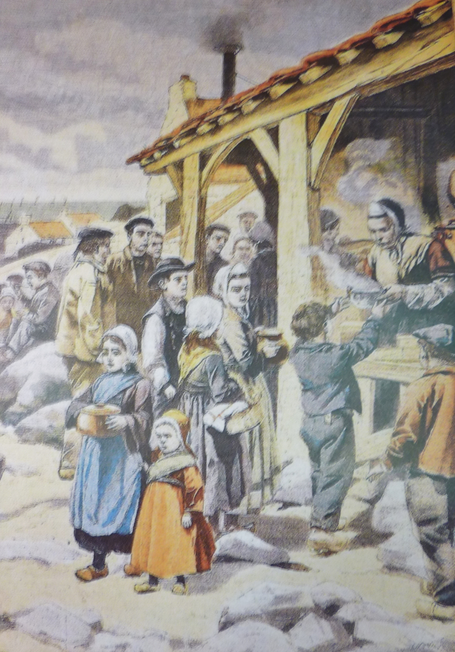 Île-Tudy : le fourneau économique 'Revue Petit Illustré du 8 février 1903). Illustration des secours apportés à la misère en Bretagne à l'époque.